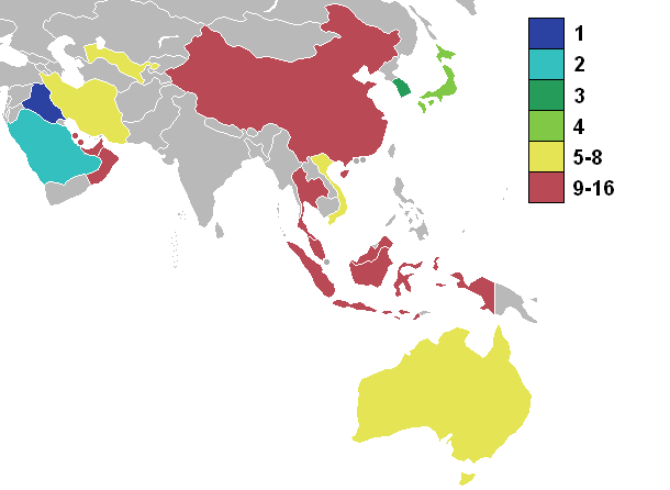 2007 AFC Asian Cup